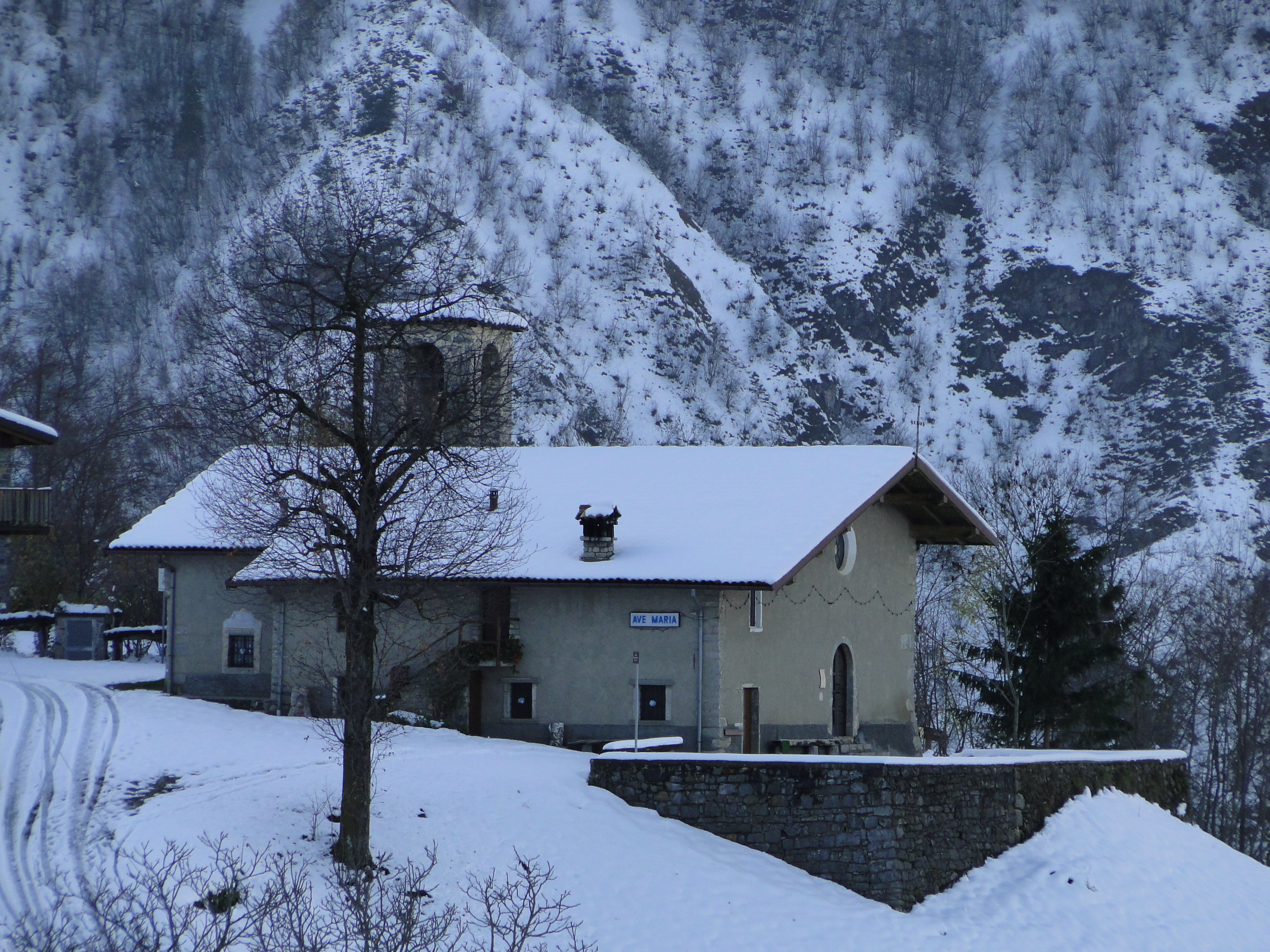 Barbata, fraz. di Colzate (BG). Chiesa Beata Vergine della Mercede